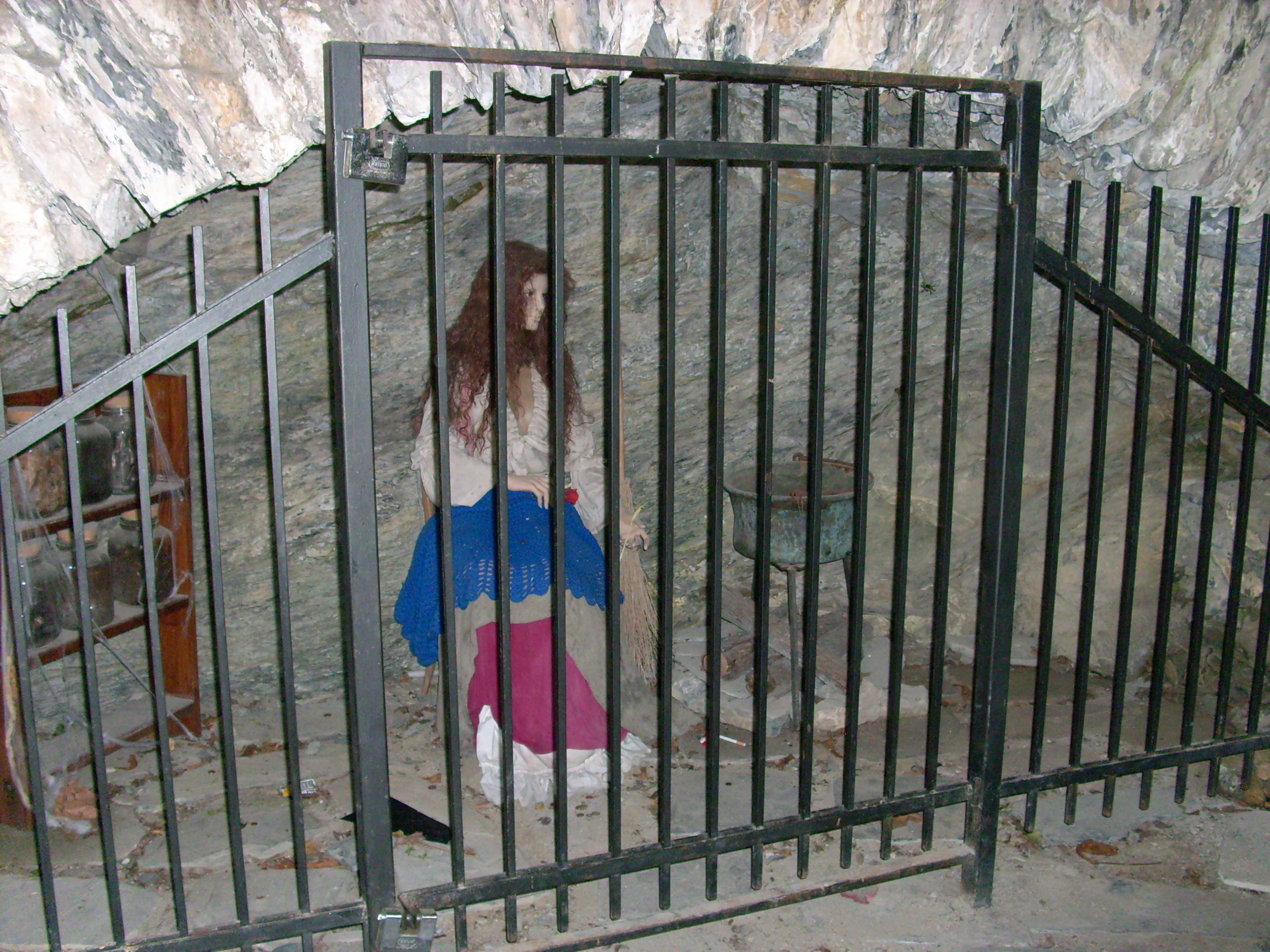 Grotta delle streghe di Triora, Liguria, Italia